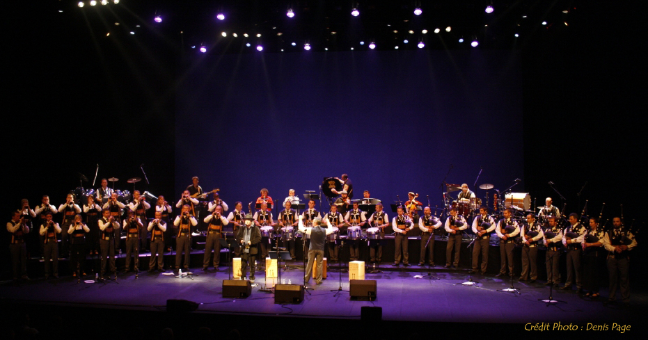 Le Bagad KEMPER en 2009 pour sa création "Breizh Balkanik" au Théâtre de Cornouaille